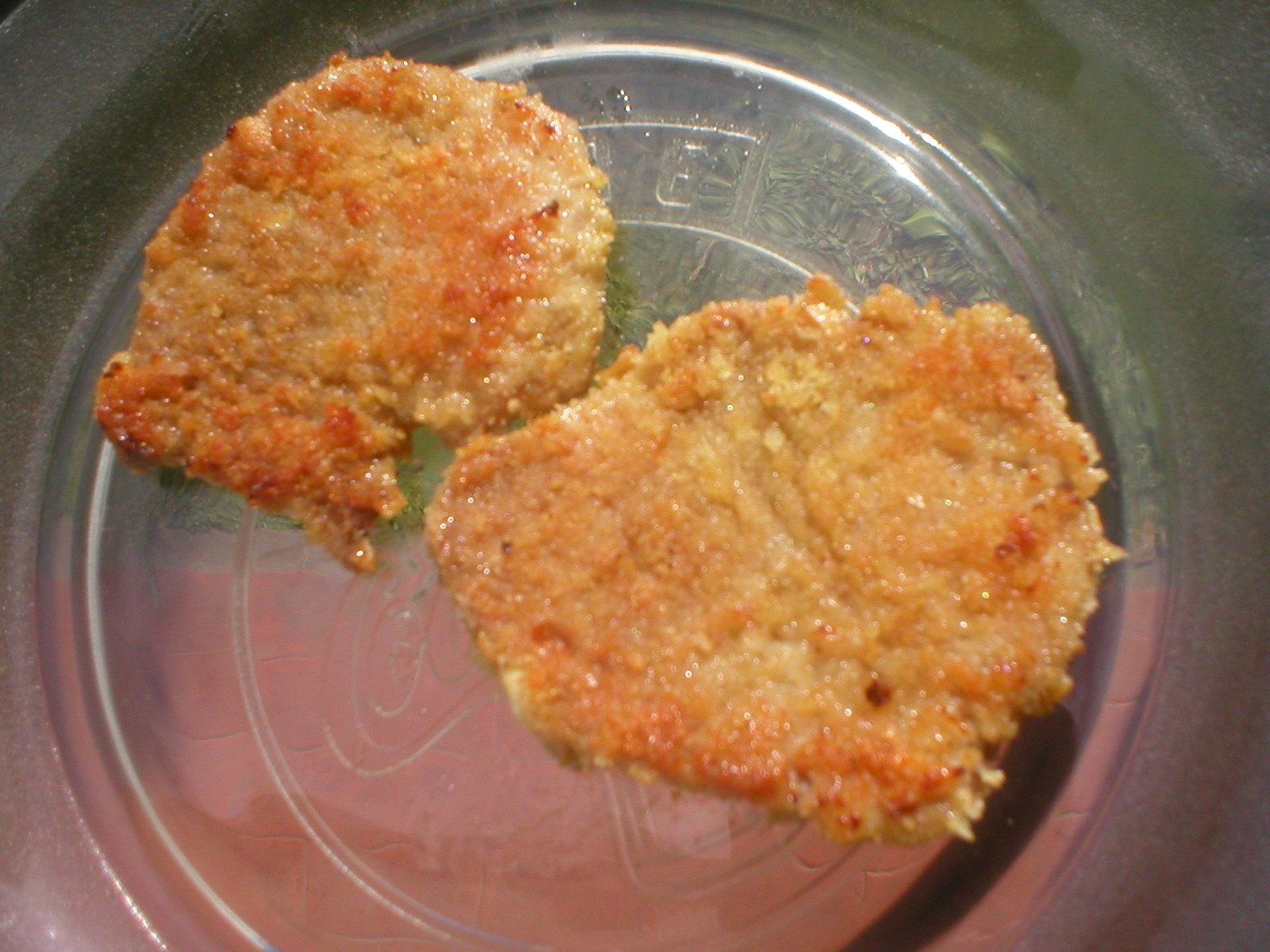 Milanesas, plato típico Argentino